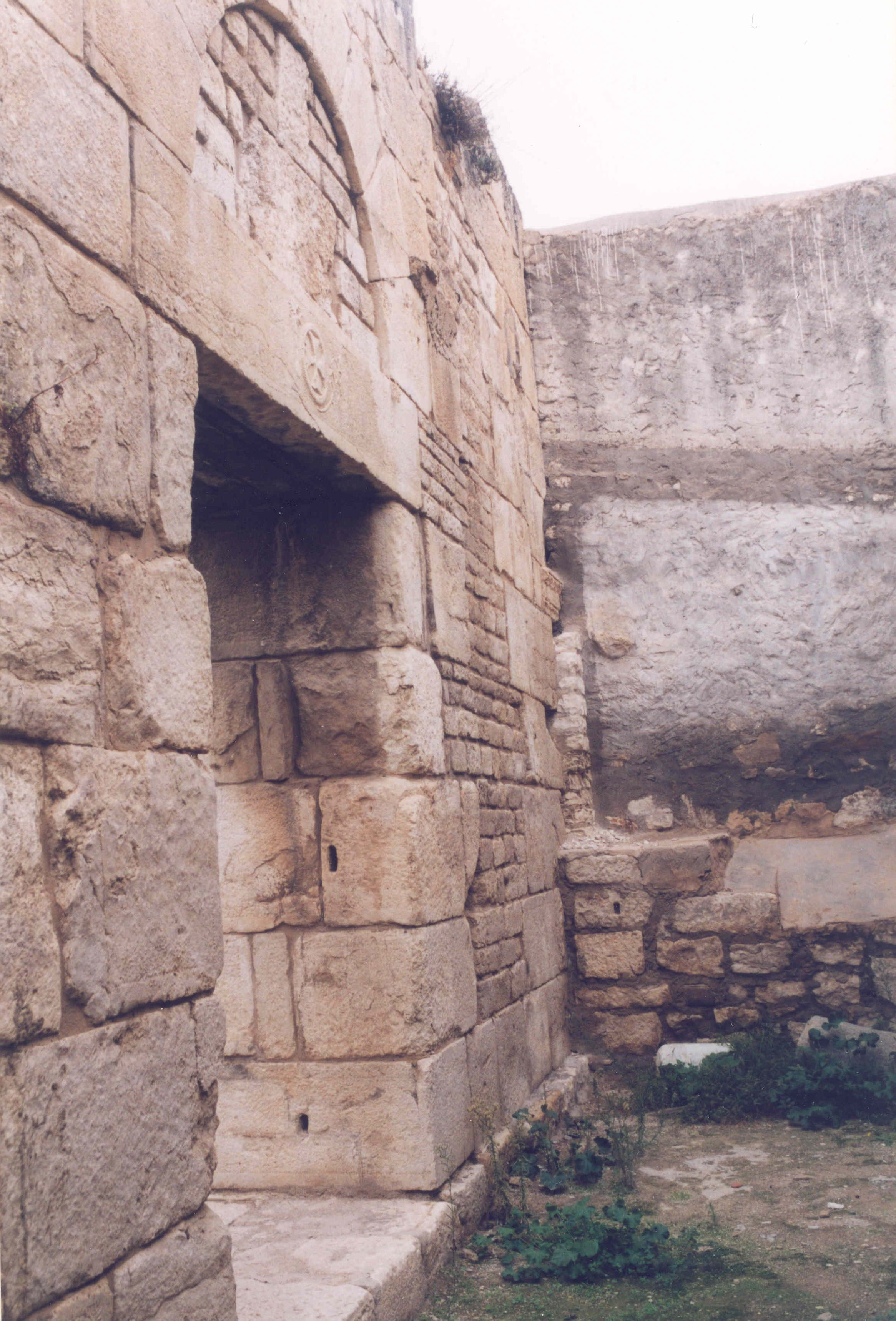 Croix grecque sur la paroi sud de la basilique de Dar el Kous au Kef en Tunisie